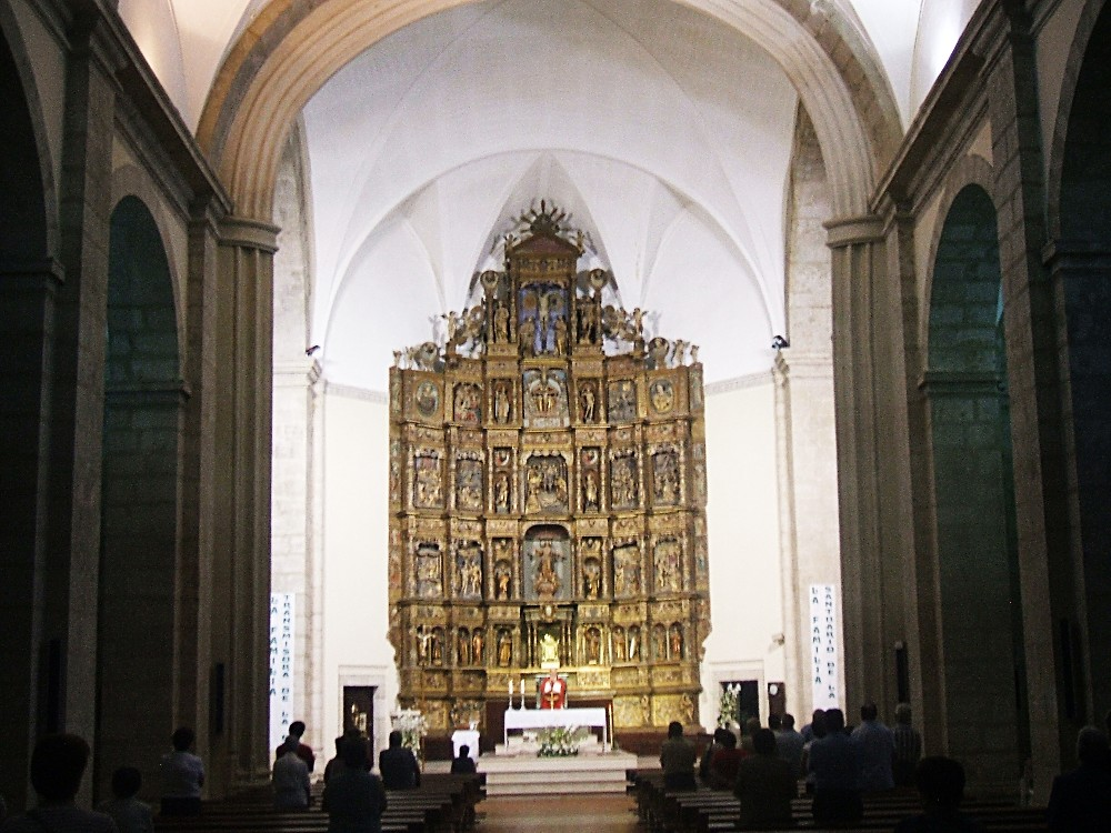 Iglesia de Nuestra Señora de la Asunción, Tarancón (Cuenca)